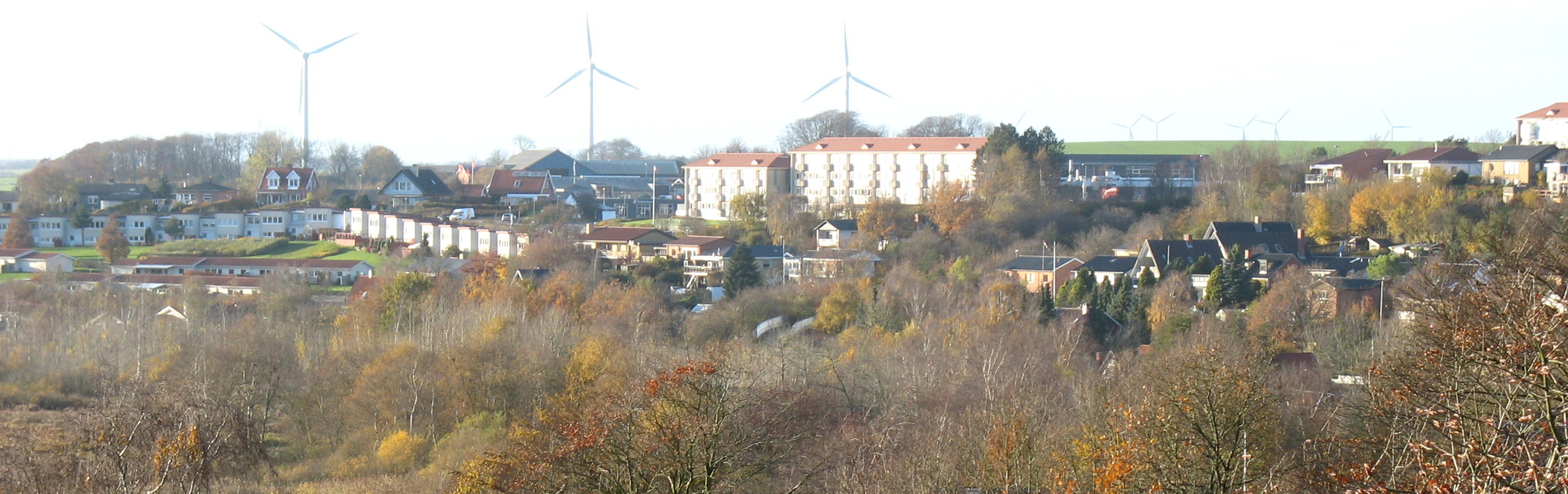 udsigt over det vestlige Skive.